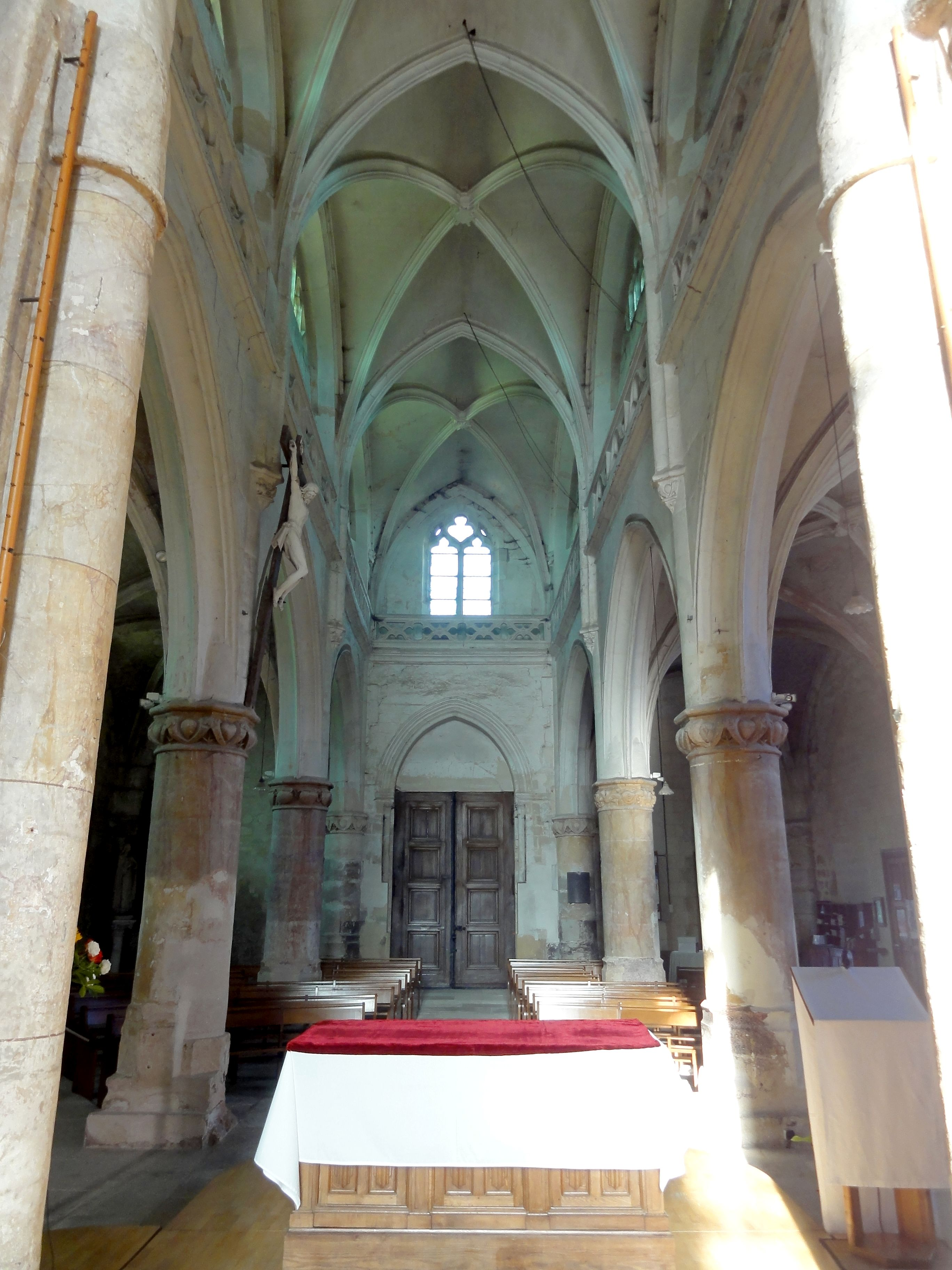 Nef, vue vers l'ouest.